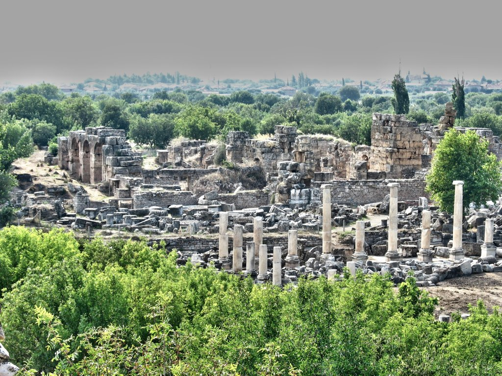 Hadrian Hamam kalıntıları..kazılar bu kısımda hala sürmekte.